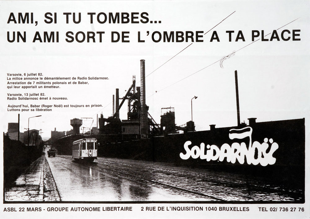 Une affiche de soutien à Roger Noël Babar éditée par l'asbl 22-Mars (Bruxelles) et le Groupe autonome libertaire (Bruxelles) - 1982